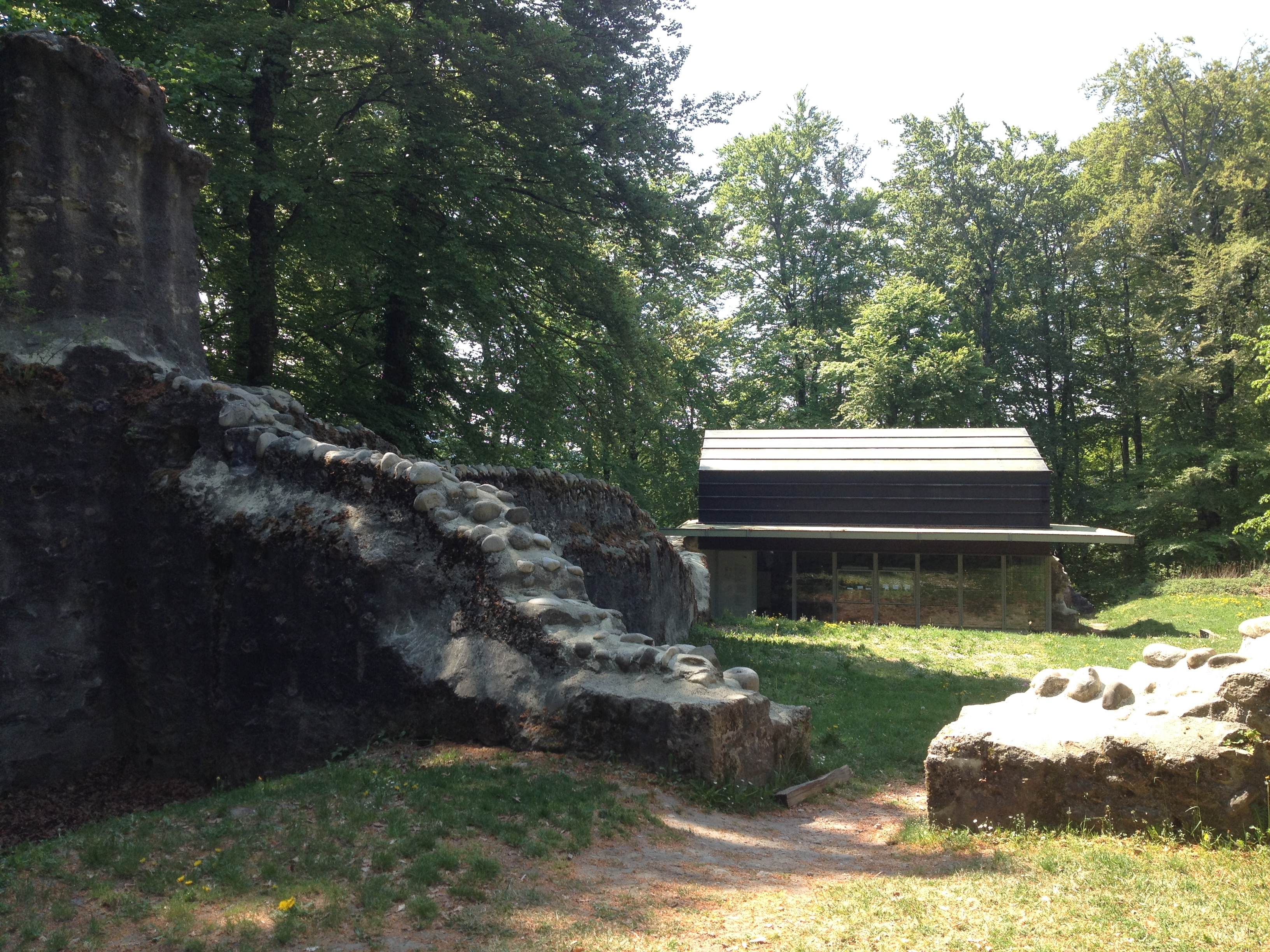 Burghof mit Schutzbau auf der Burgruine Grünenberg, Melchnau